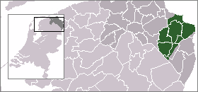 Kaart 2.